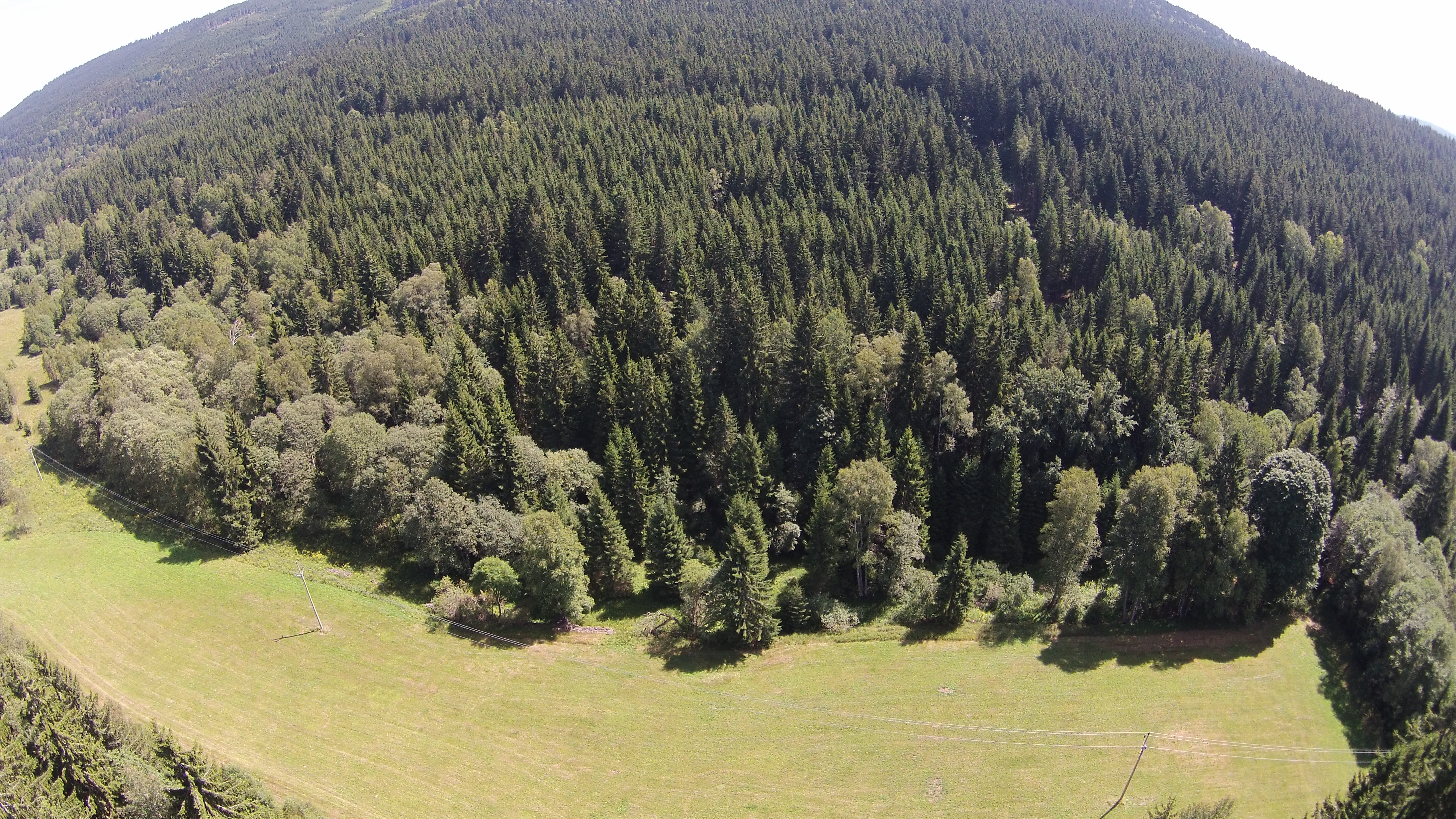 Přírodní památka Pod Ostrohem. Česká republika.